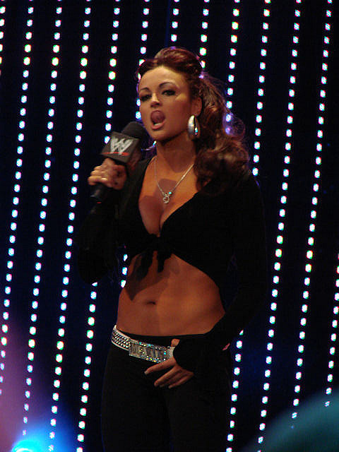 WWE Diva Maria. Cropped